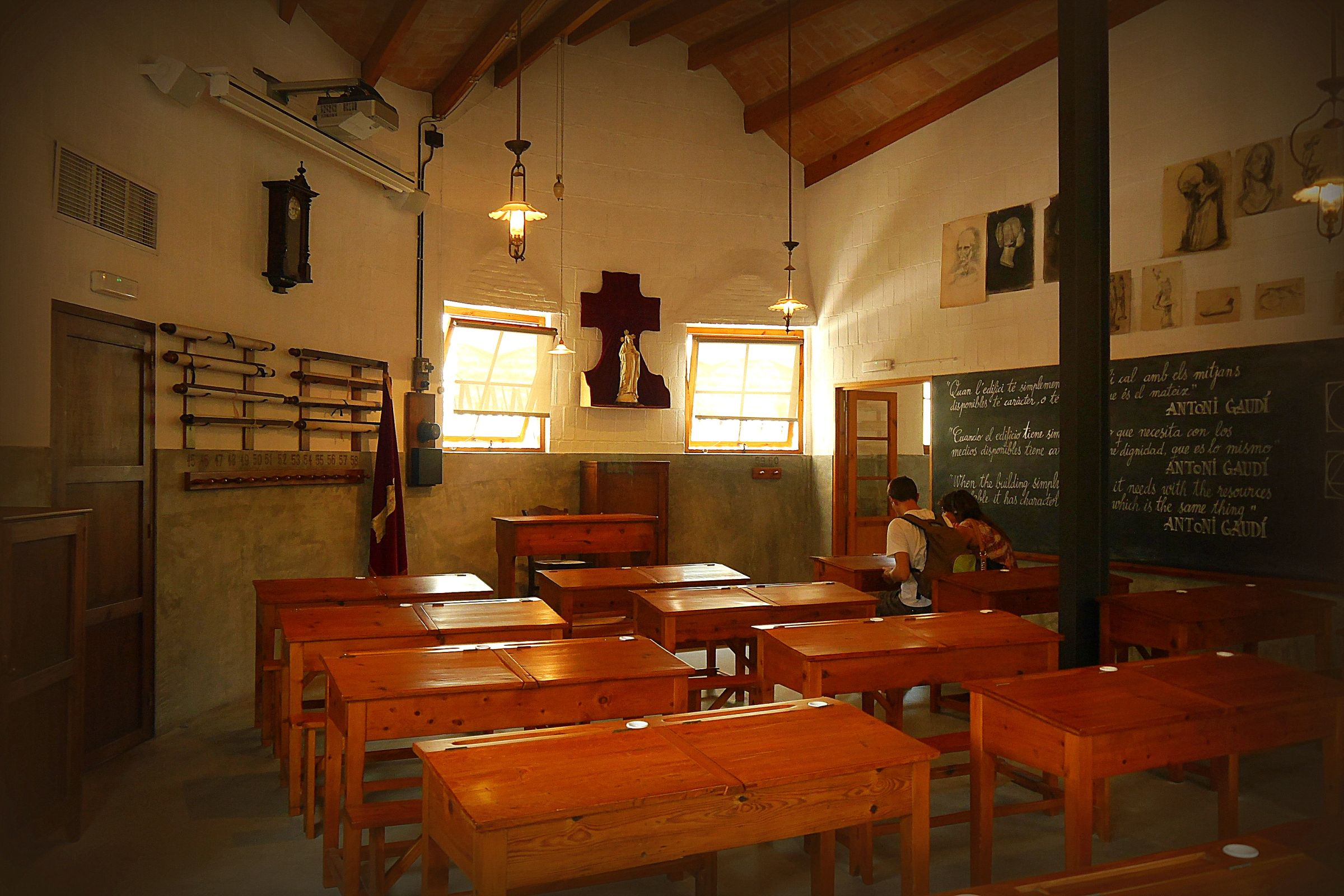 Altes Klassenzimmer der Schule neben der Sagrada Familia